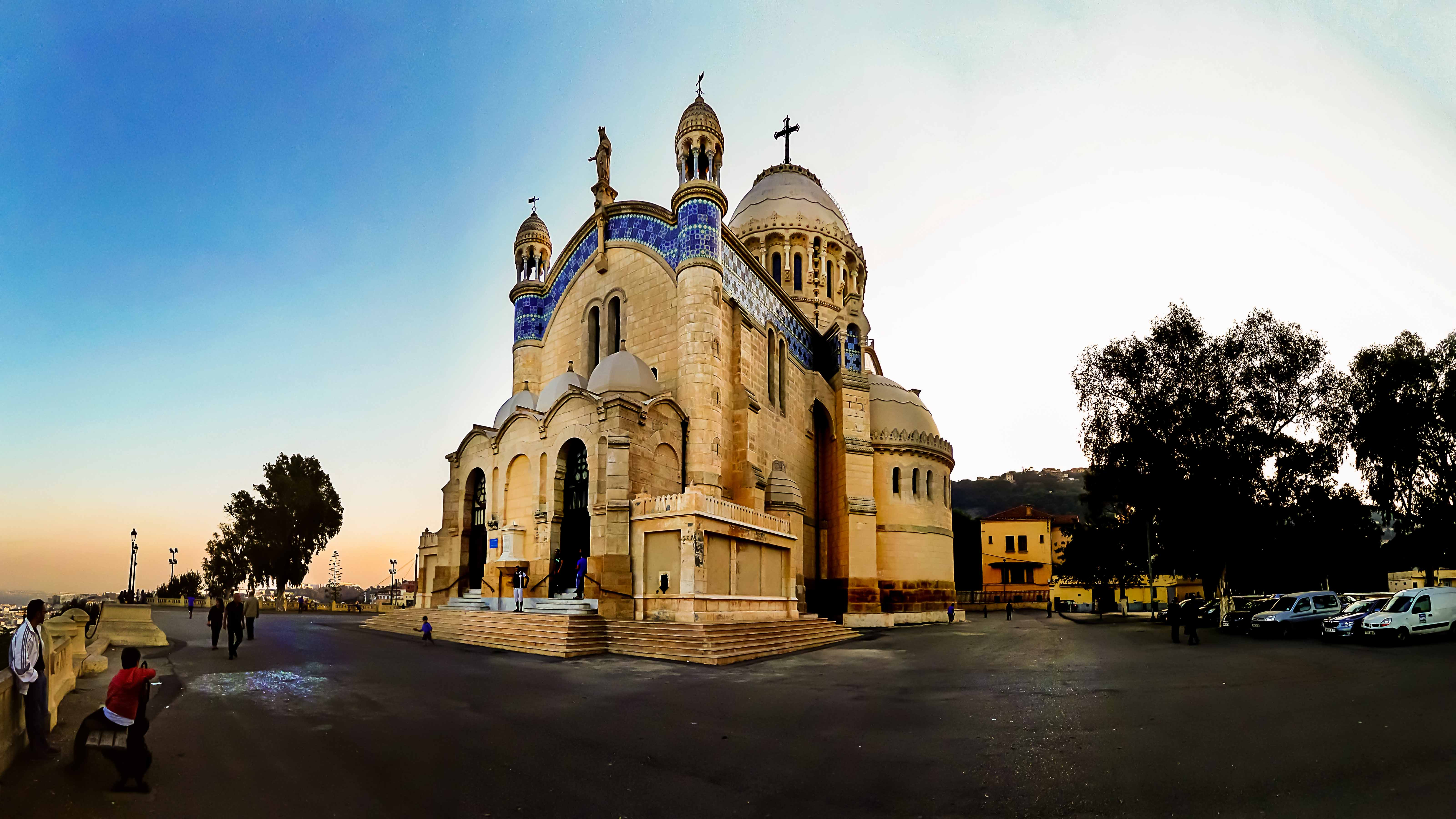 Basilique Notre dame d'Afrique à Alger كنيسة السيدة الافريقية بالجزائر العاصمة